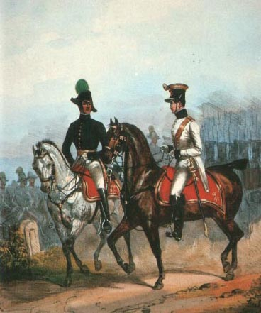 österreichisch-ungarischer Generalquartiermeisterstab - Stabsoffizier und Adjutant Mitte des 19.Jahrhunderts